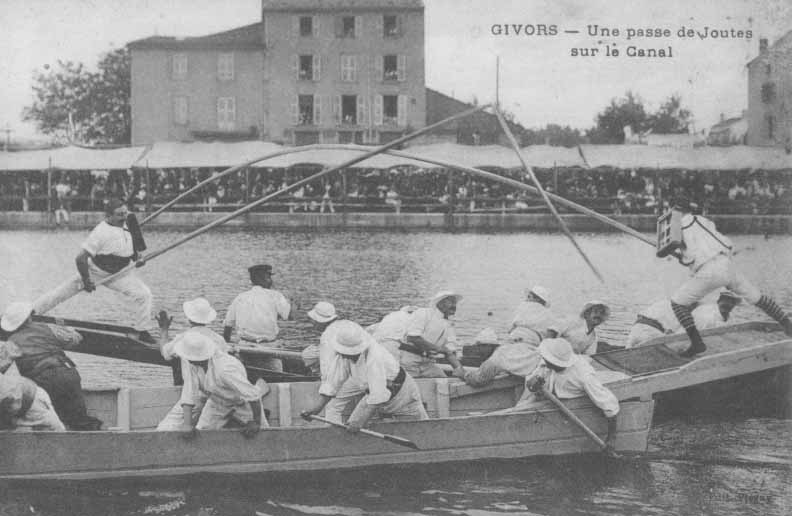 Joute Givordine entre 1900 et 1950 a Givors